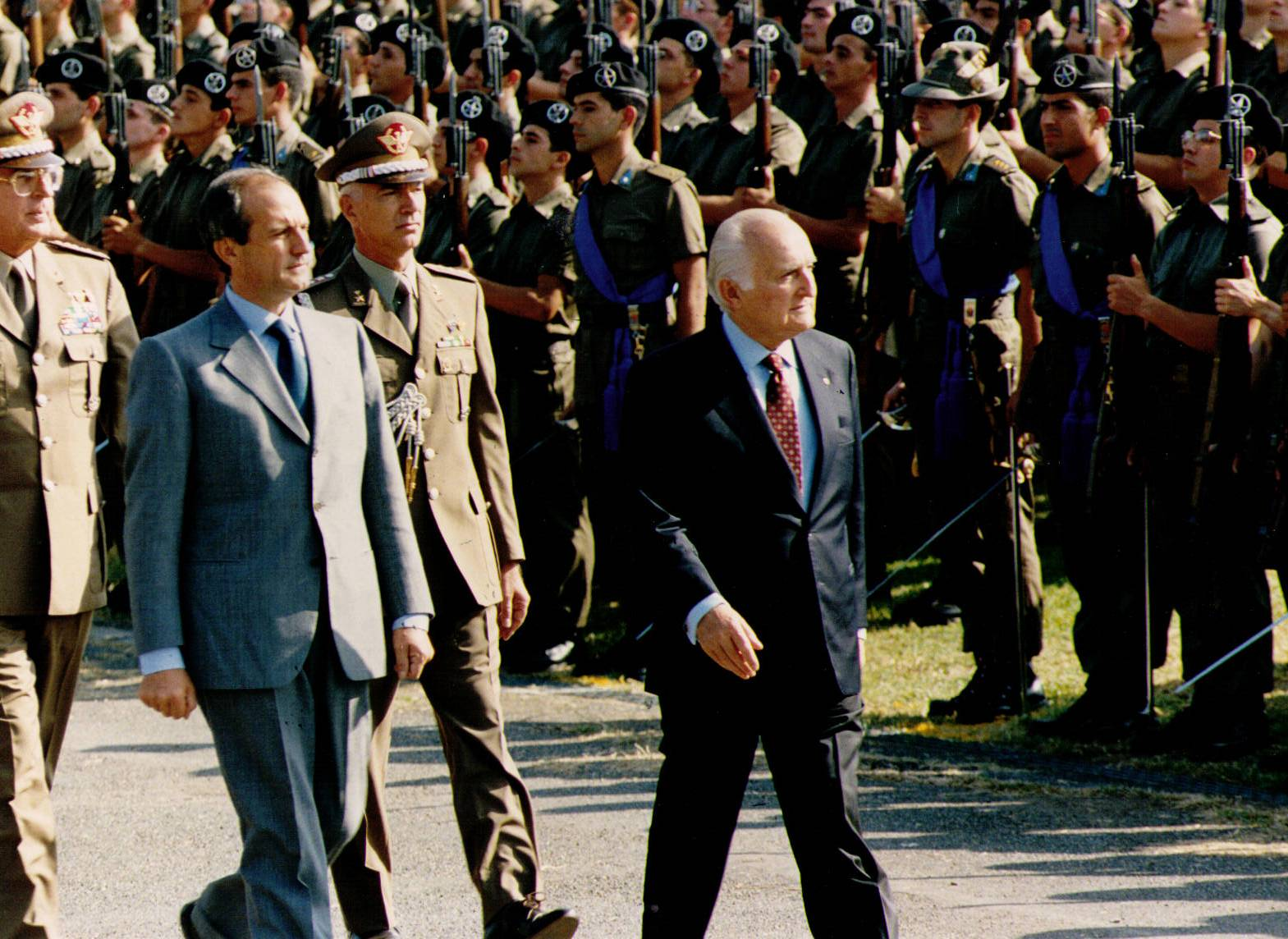 Andò passa in rassegna i reparti dell'Esercito insieme al Presidente Scalfaro